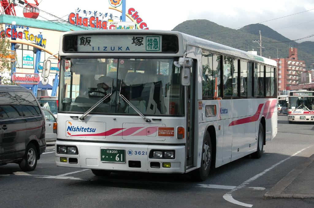 砂津－飯塚特急 2004-9-14撮影